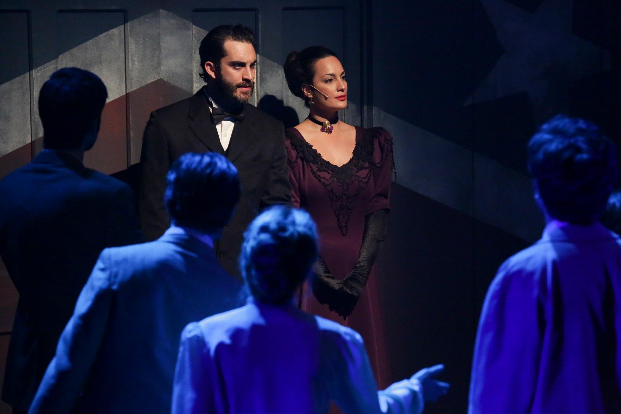 ( עדי ארד כסאלי סלוטון) במחזמר "המצעד" פסטיבל ישראל 2012 בבימוי משה קפטן (לצידה השחקן cooper gordin)